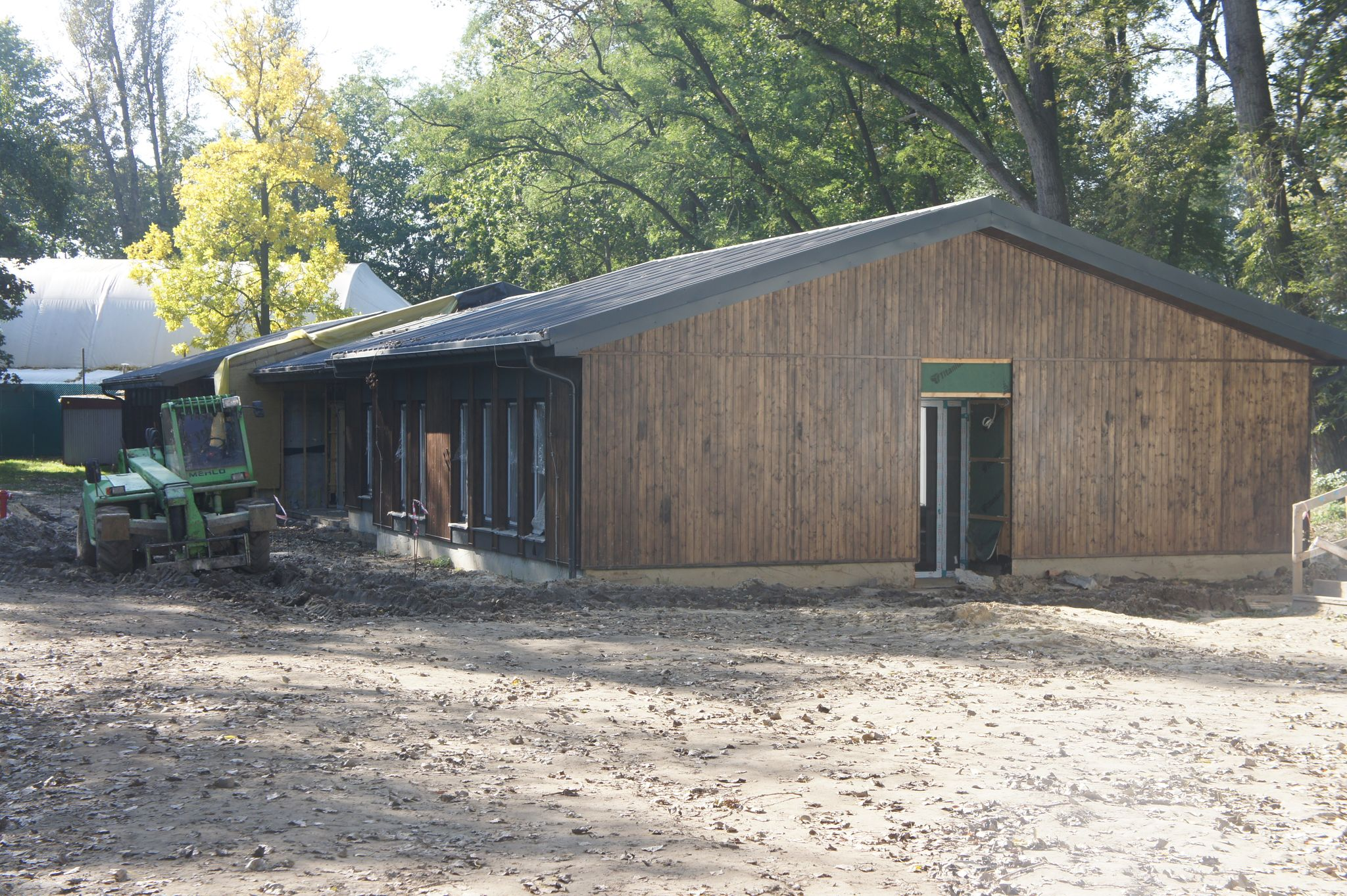 Budowa "Przystani Warszawa" przy Porcie Czerniakowskim.